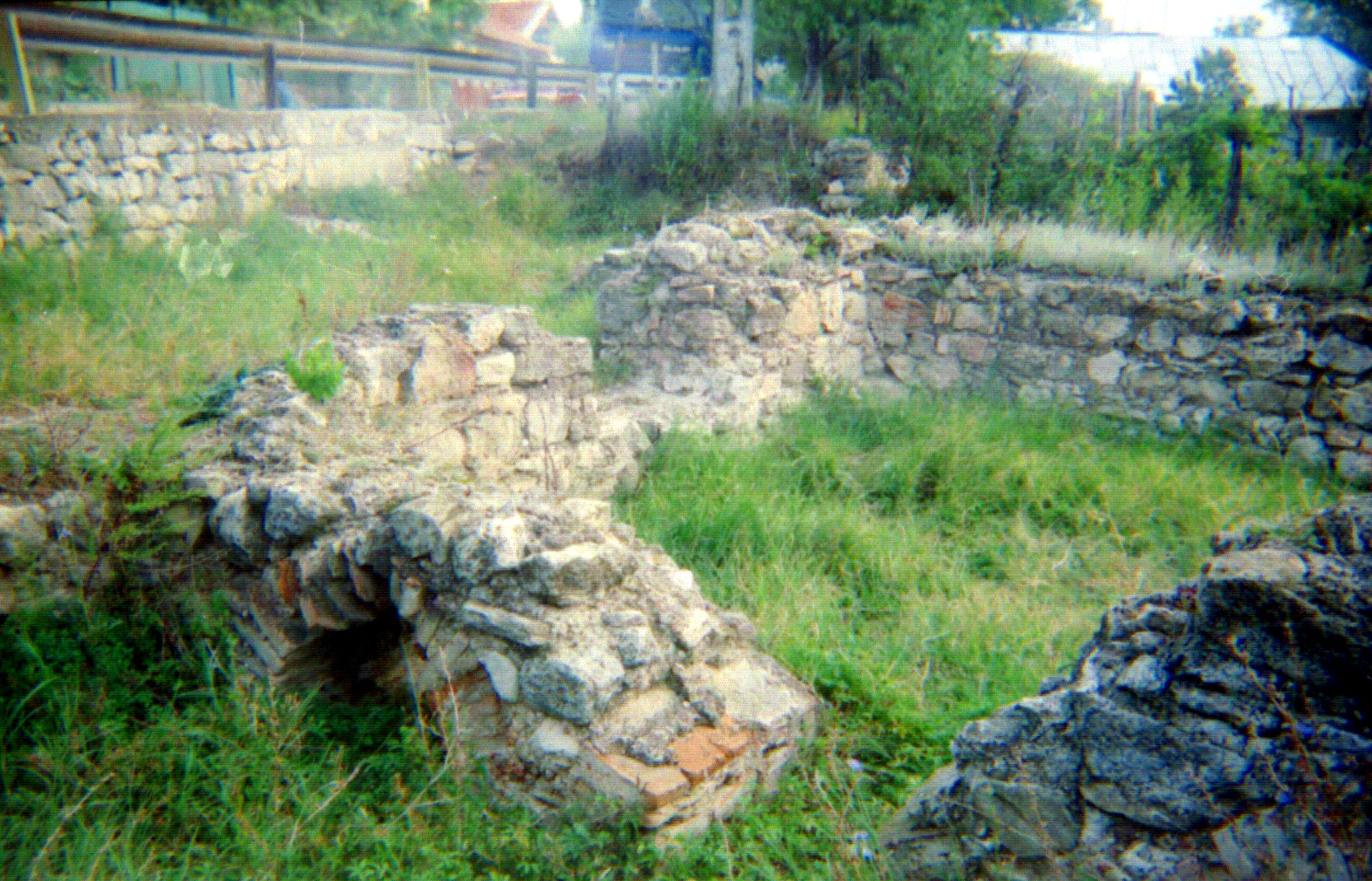 Roman thaermae, Pietroasele, Buzau county, Romania